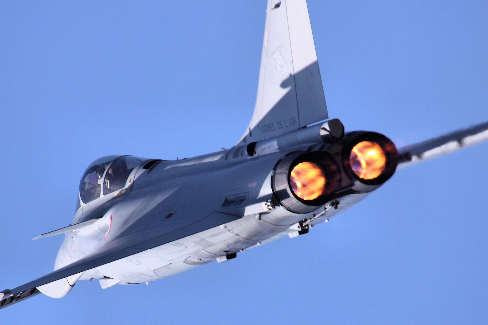 Rafale - RIAT 2013